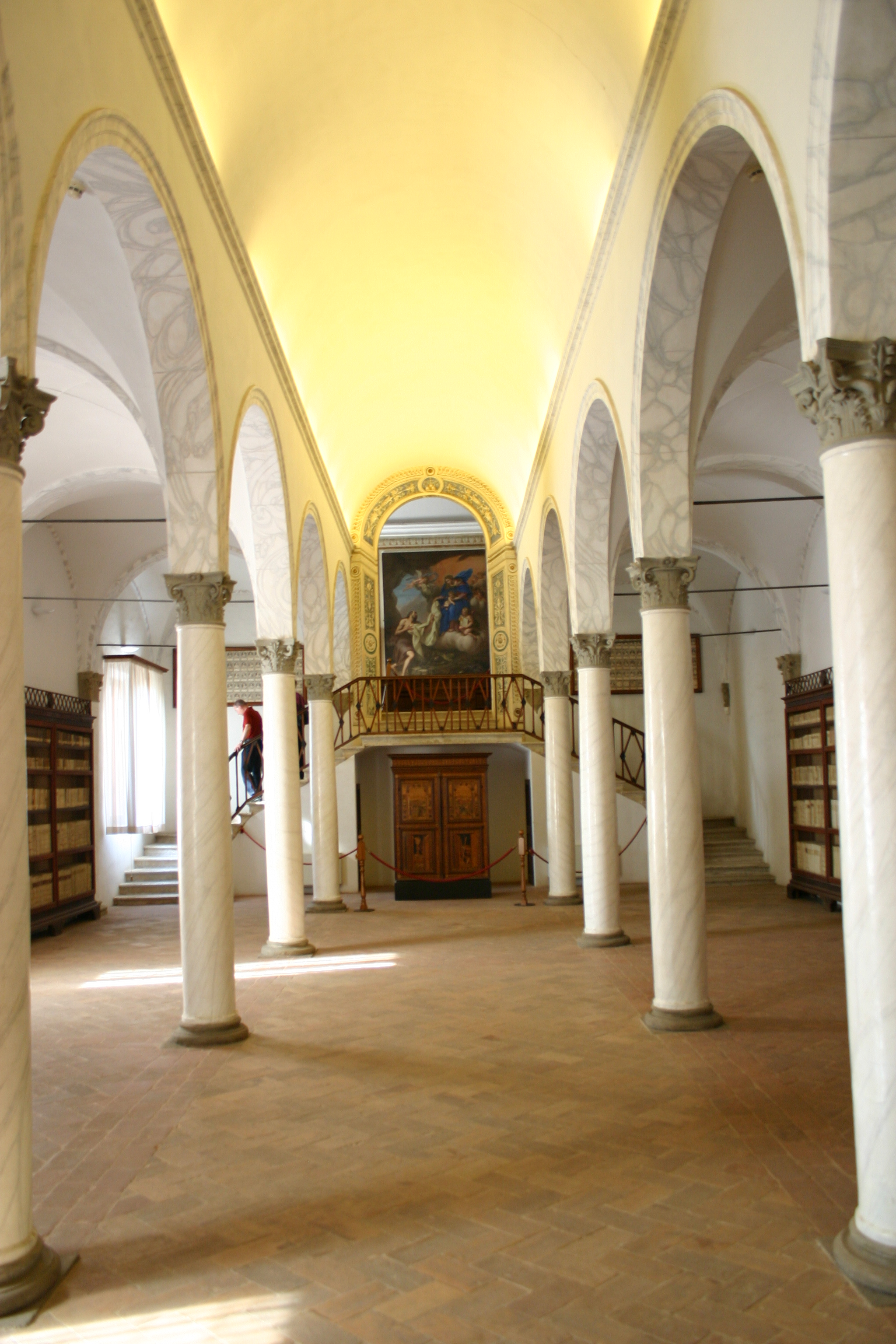 Abbazia territoriale di Monte Oliveto Maggiore - Biblioteca